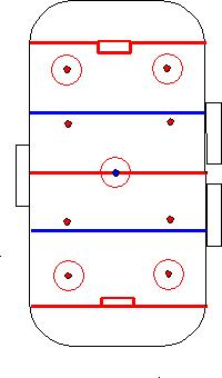 Voorbeeld van sledgehockey speelveld